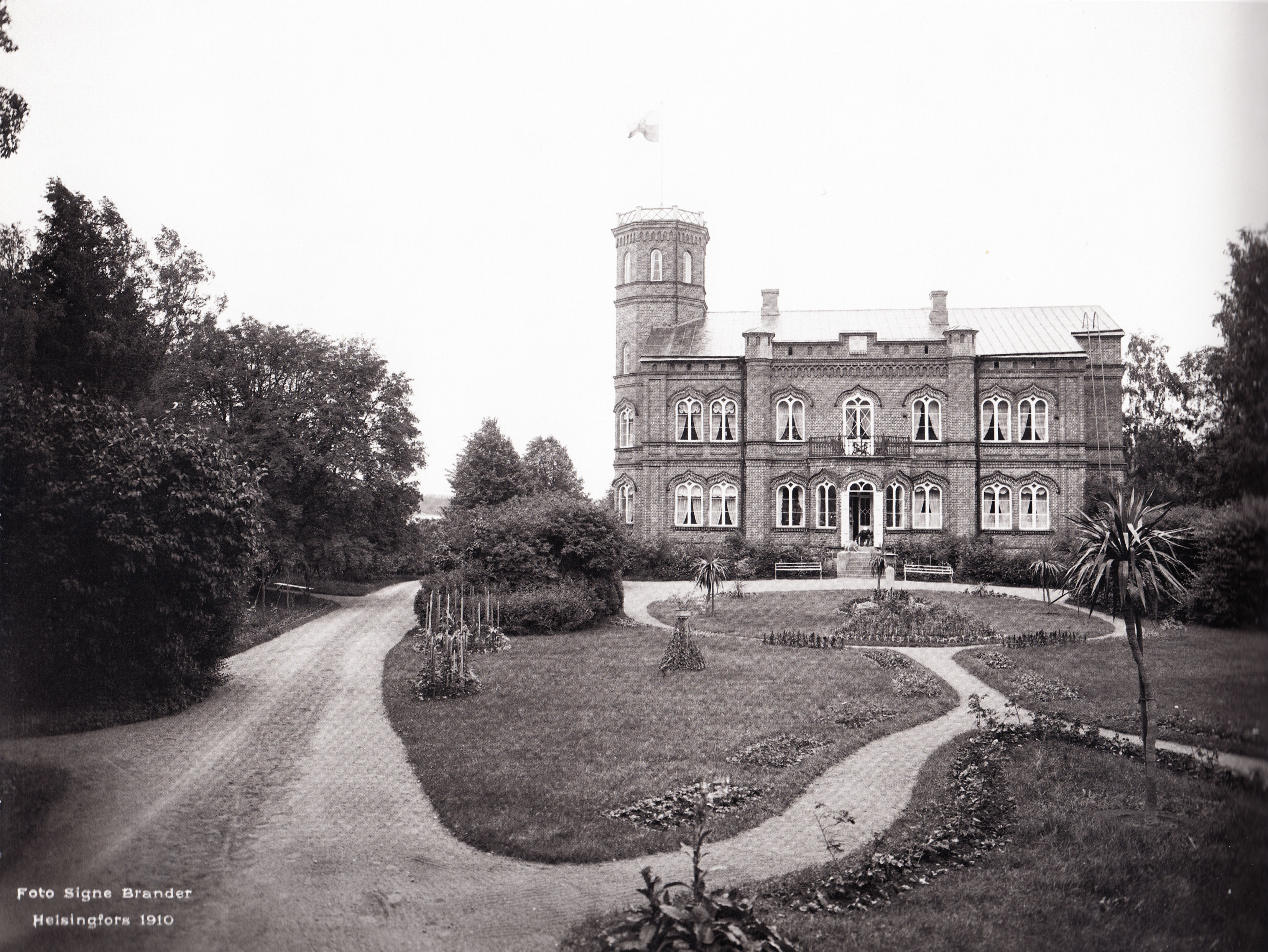 Tjusterbyn kartano